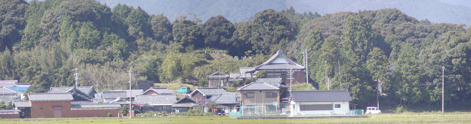 寺院の遠隔撮影したもの